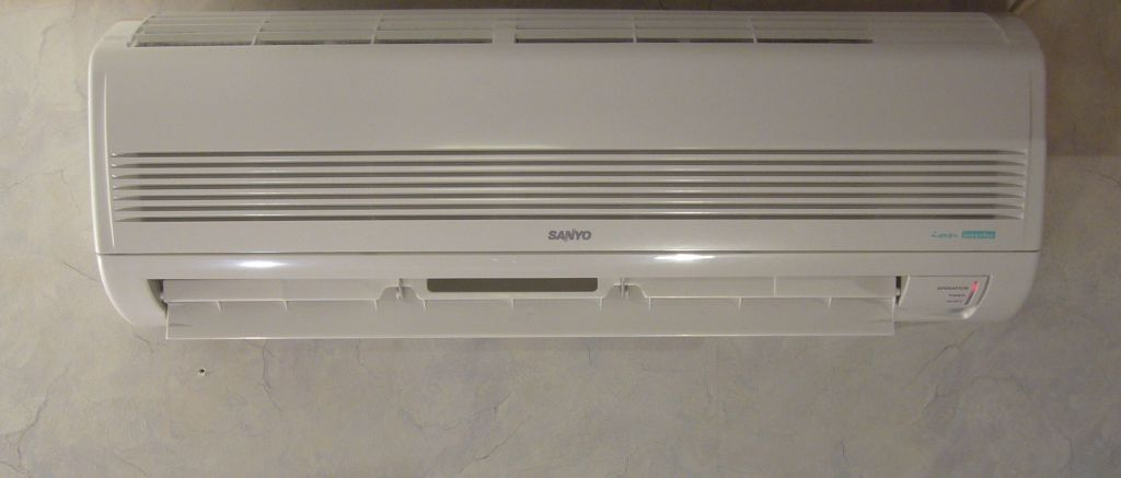 Sanyo SAP-KRV-93EH heat pump indoor unit Sanyo SAP-KRV-93EH ilmalämpöpumpun sisäyksikkö